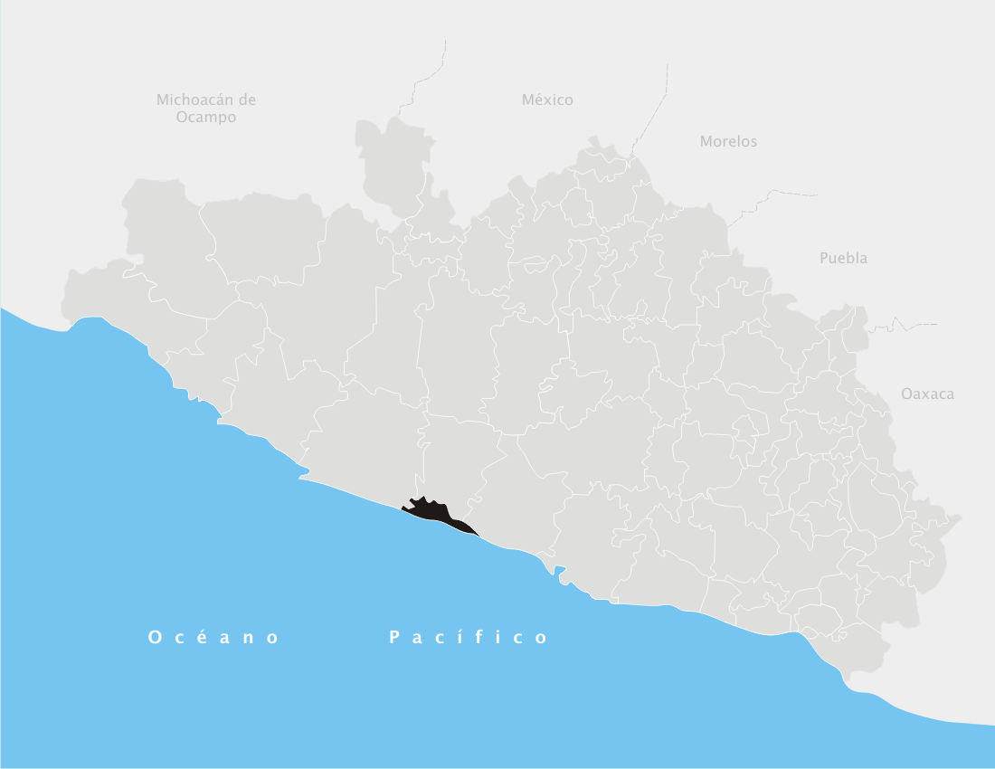 Benito Juárez en el estado de Guerrero (México)